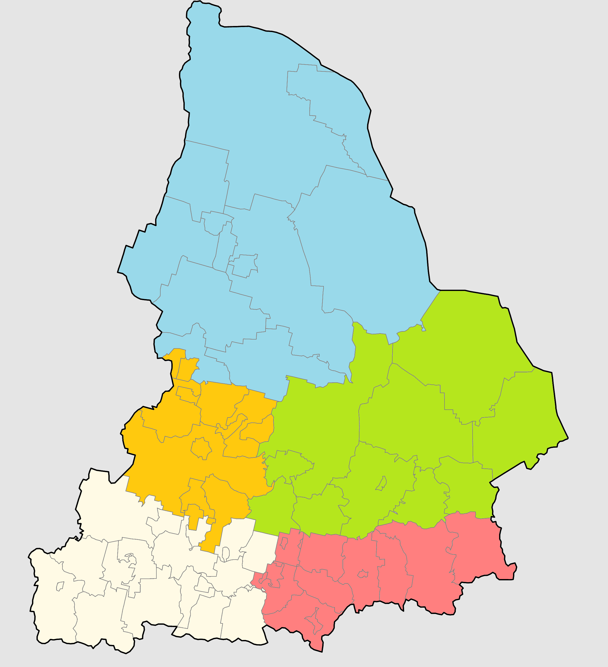 Границы епархий Екатеринбургской митрополии на карте Свердловской области по состоянию на 2018 год.